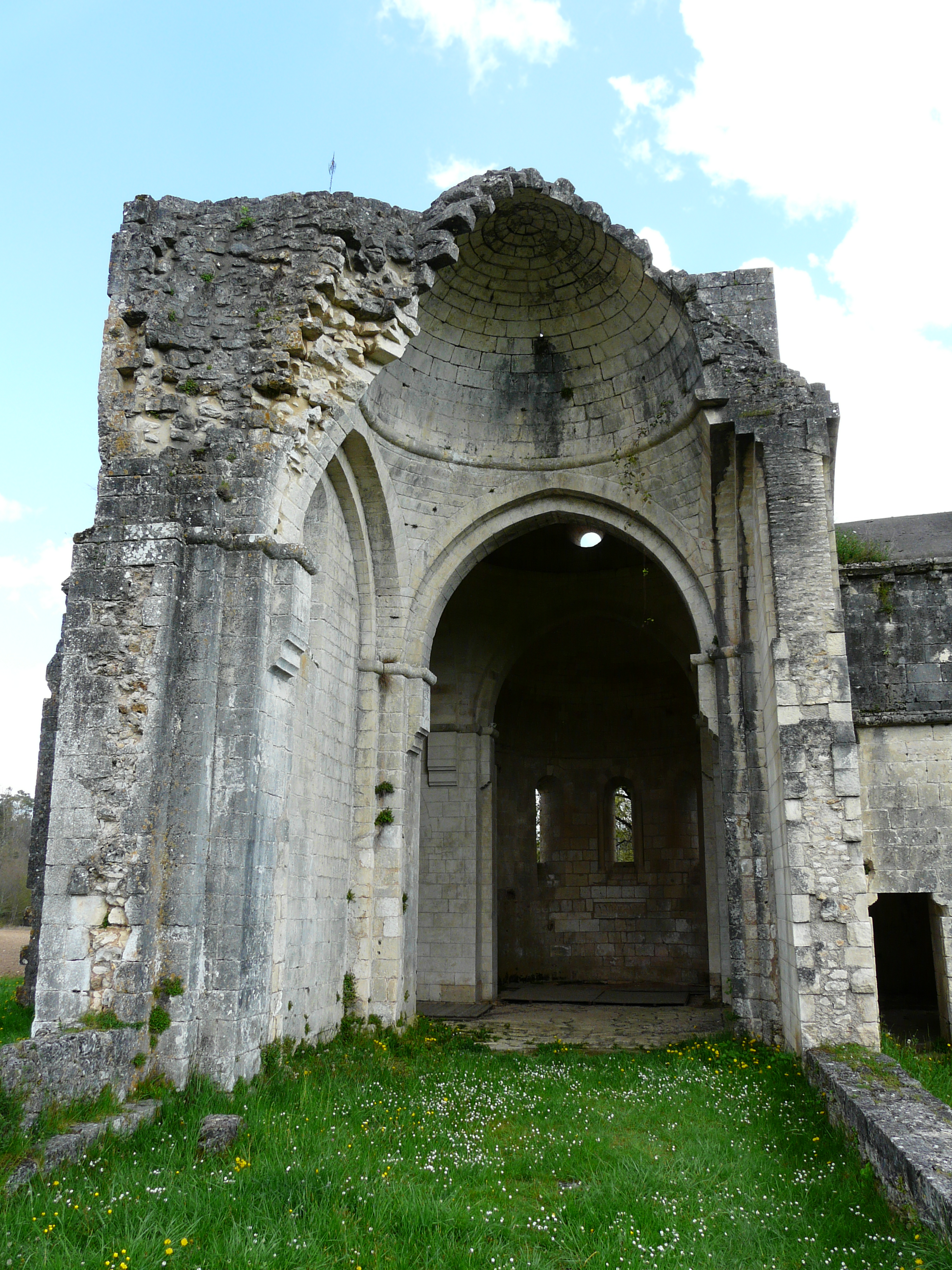 L'alignement de l'ancienne nef, ruines de l'abbaye de Boschaud, Villars, Dordogne, France